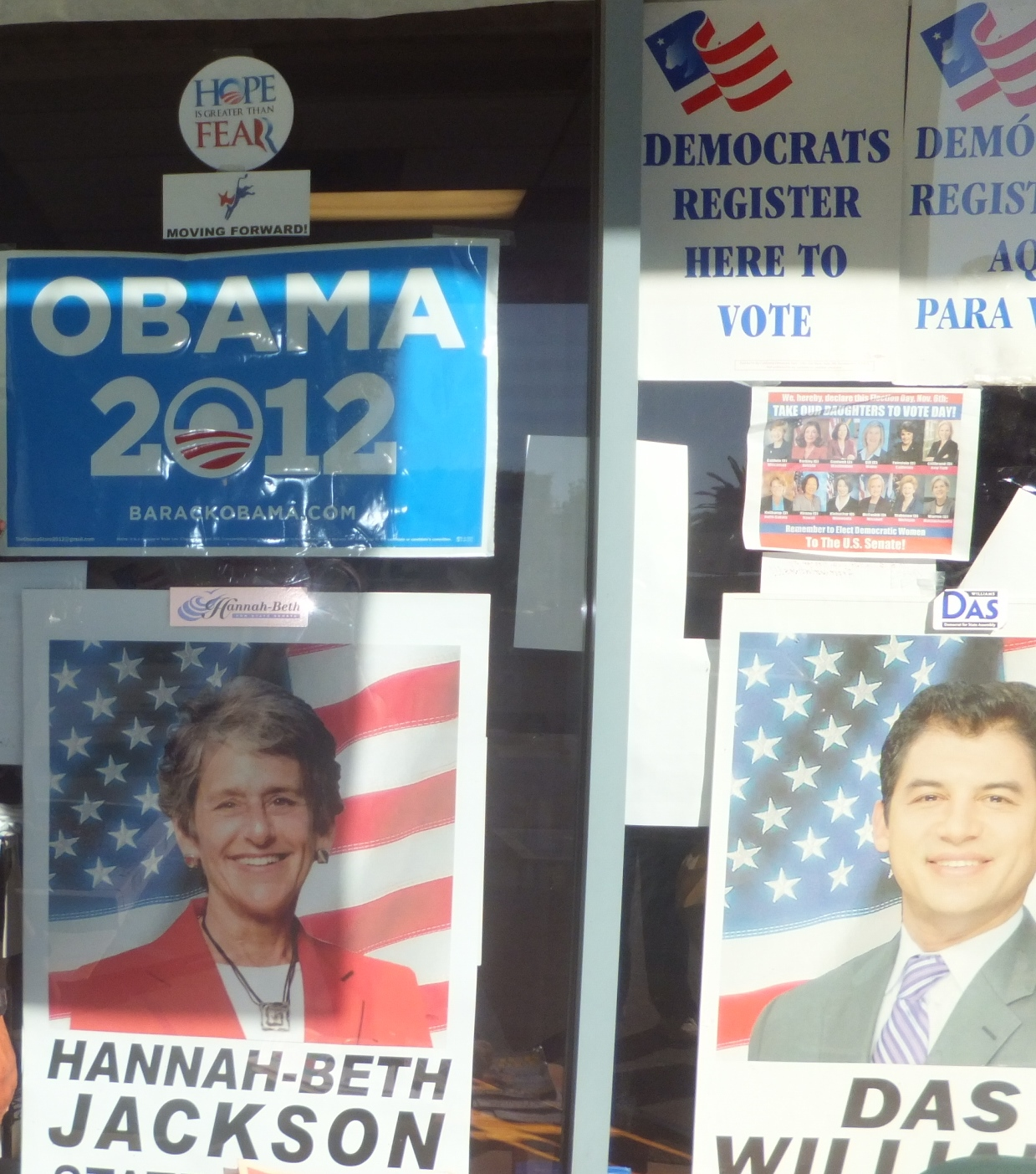 සිංහල: අමෙරිකා එක්සත් ජනපදහි ප්‍රජාතාන්ත්‍රික (ඩිමොක්‍රටික්) පක්‍ෂ කාර්යාලයක බාහිරට පෙනෙනසේ අලවාඇති චන්ද ප්‍රචාරක සහ වෙනත් දැන්වීම්